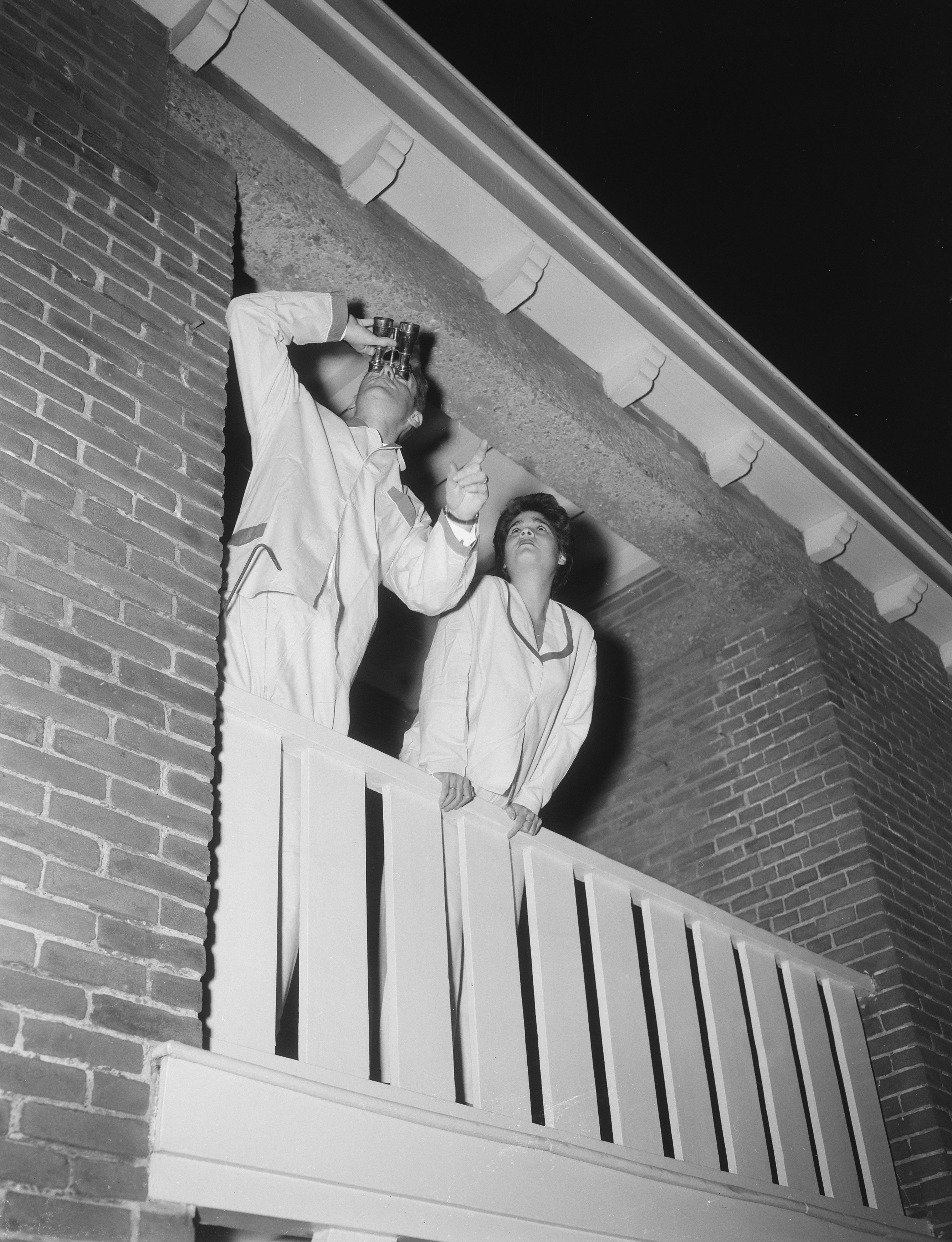 Collectie / Archief : Fotocollectie Anefo Reportage / Serie : [ onbekend ] Beschrijving : Russische kunstmaan passeert Nederlanders, mensen in pyjama staan te kijken Datum : 16 oktober 1957 Trefwoorden : kunstmanen, ruimtevaart Fotograaf : Pot, Harry / Anefo Auteursrechthebbende : Nationaal Archief Materiaalsoort : Negatief (zwart/wit) Nummer archiefinventaris : bekijk toegang 2.24.01.04 Bestanddeelnummer : 909-0359